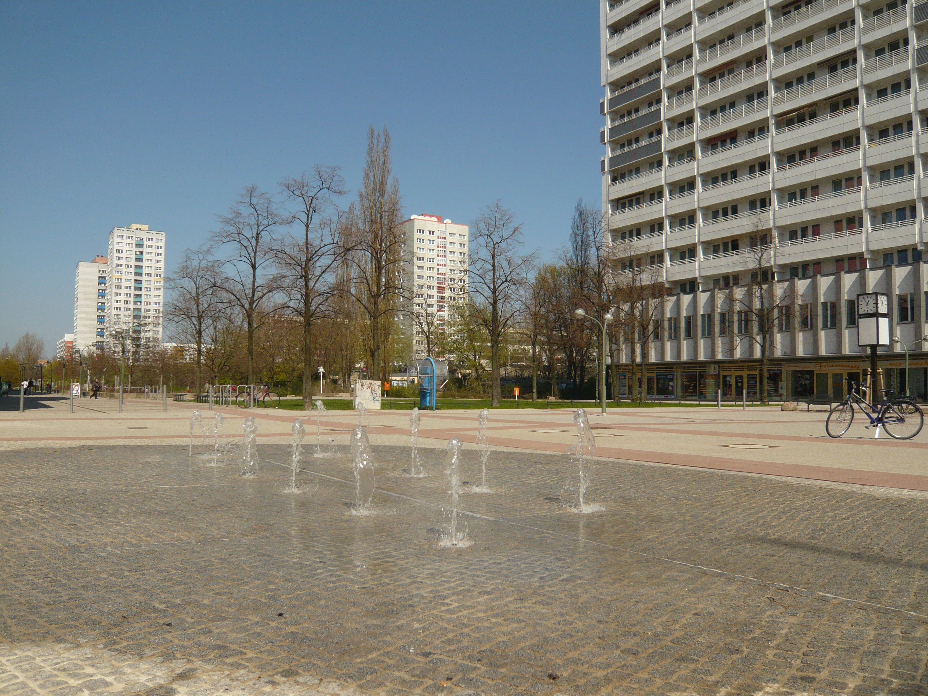 Anton-Saefkow-Platz: neue Wasserspiele vom Oktober 2009